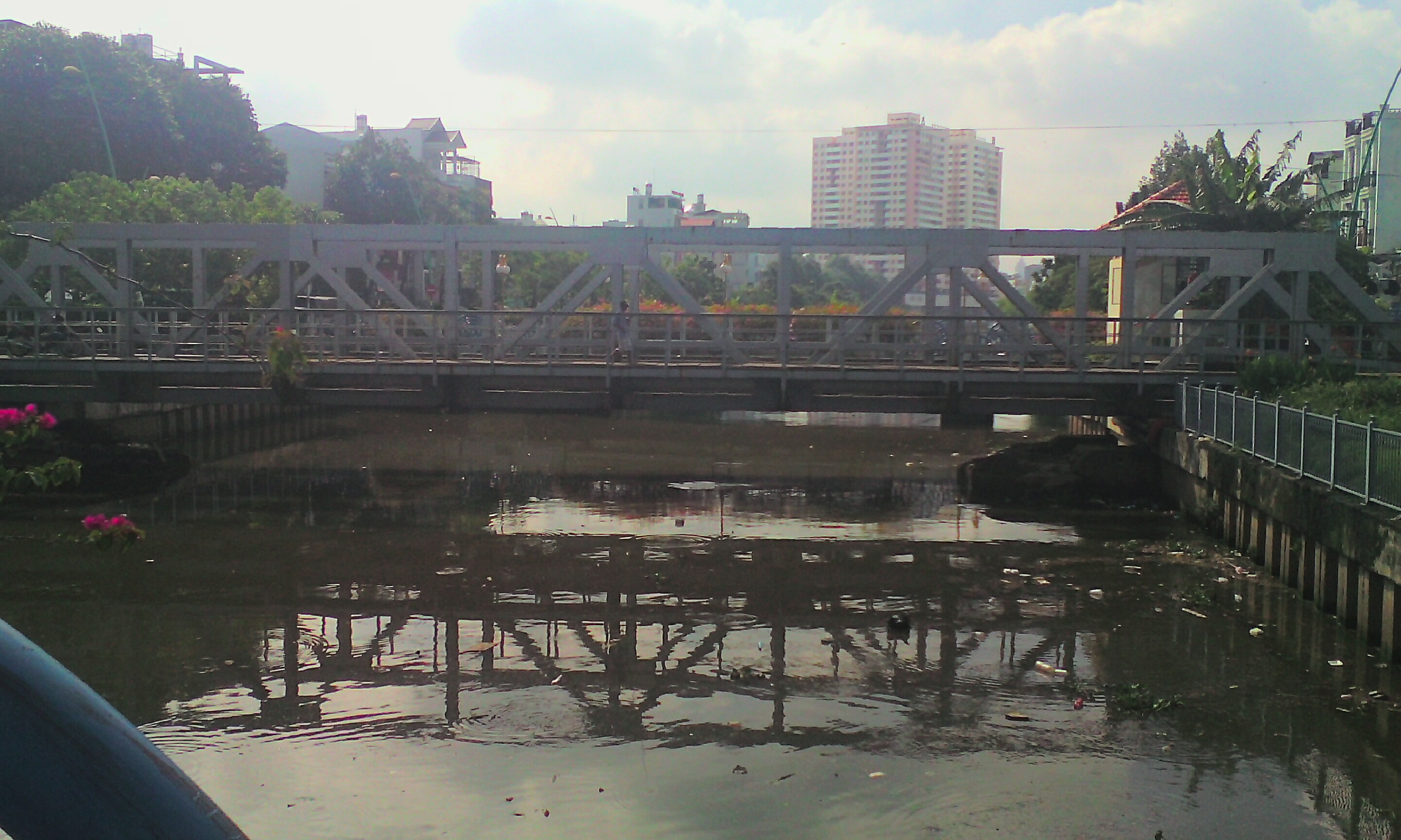 Kênh NL-TN và cầu Bà Xép nhìn từ cầu số 6